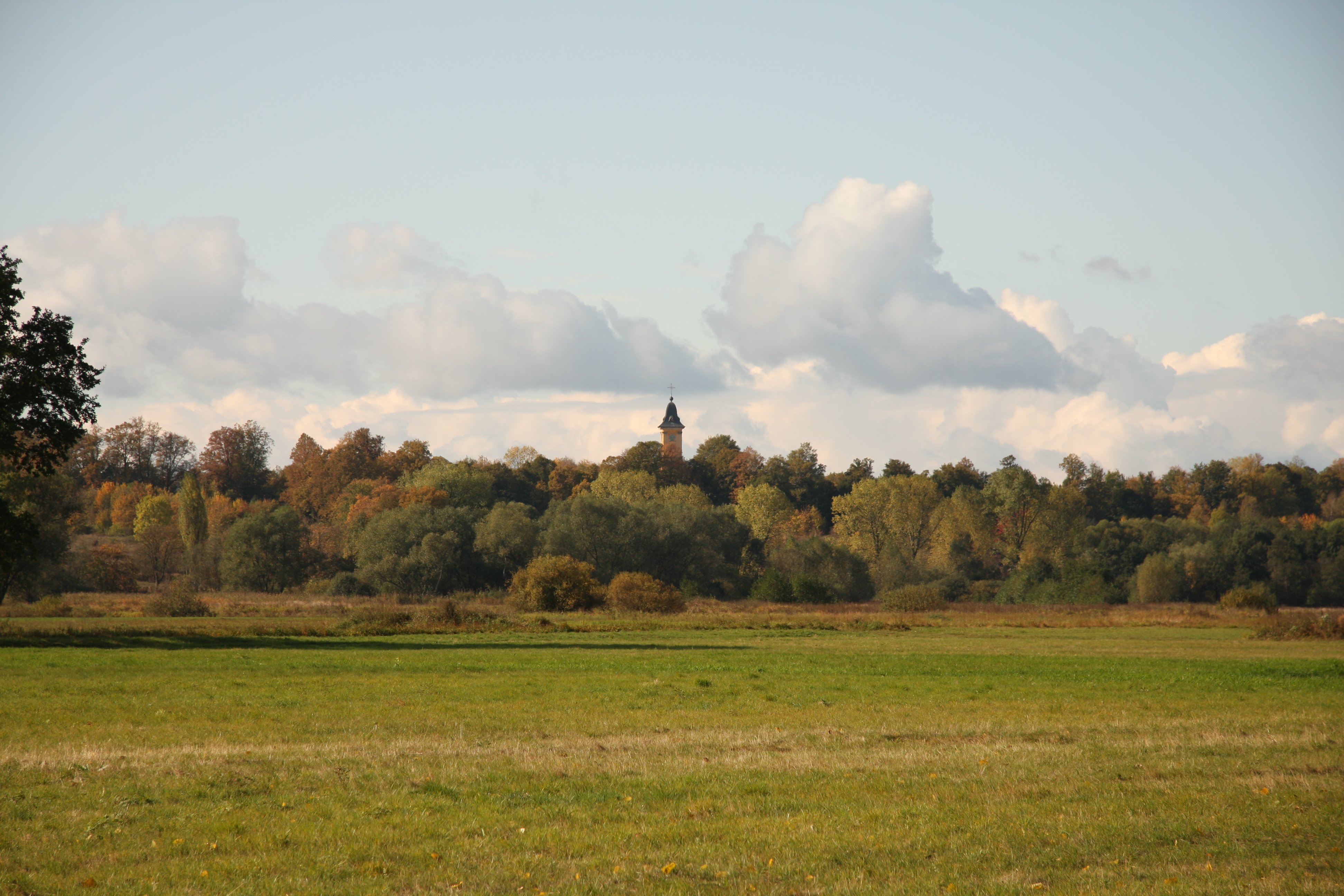 Josefovské louky